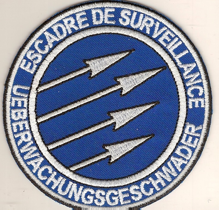 Ueberwachungsgeschwader